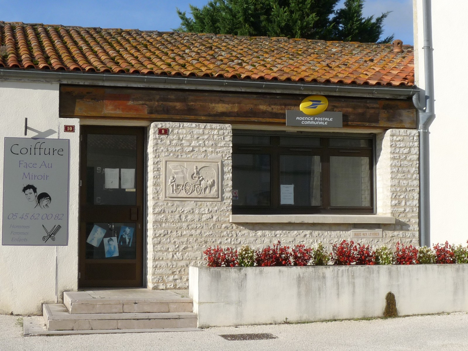 Bureau de poste et salon de coiffure, Verdille, Charente, France